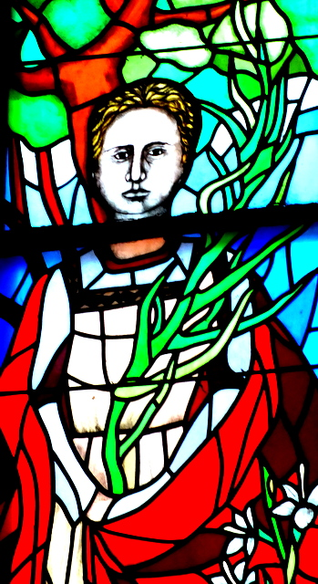 Bł. Karolina Kózkówna na witrażu w bazylice konkatedralnej WNMP w Kołobrzegu